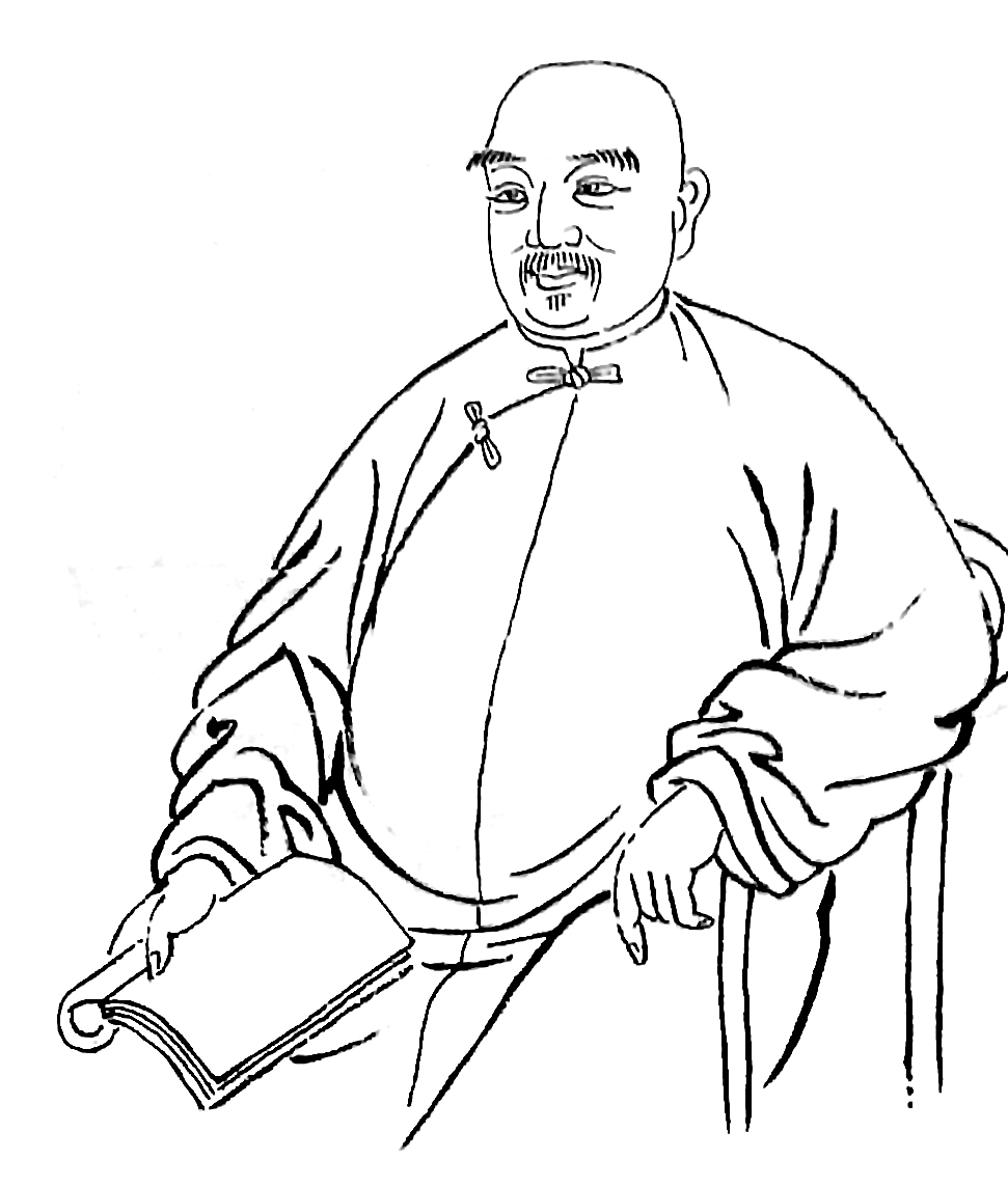 中文（中国大陆）: 大理州博物馆-人像-王崧